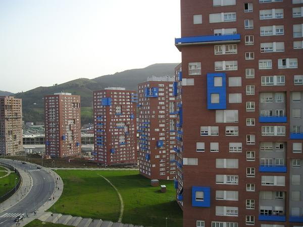 San Vizenteko dorreak.